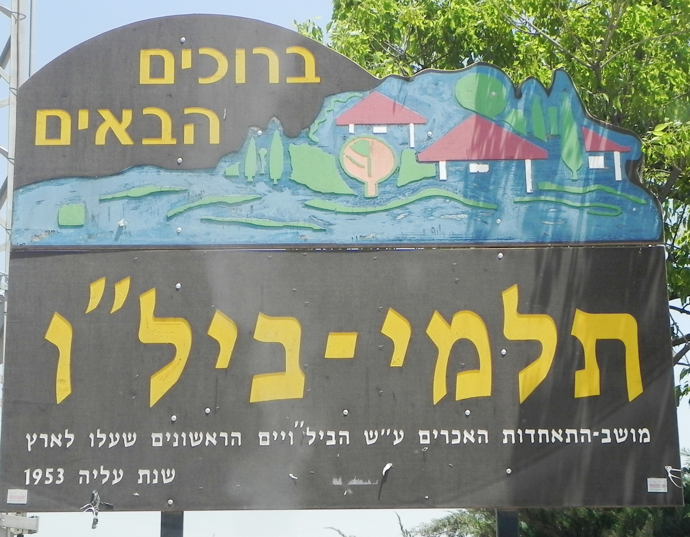 תלמי בילו שלט הכניסה למושב